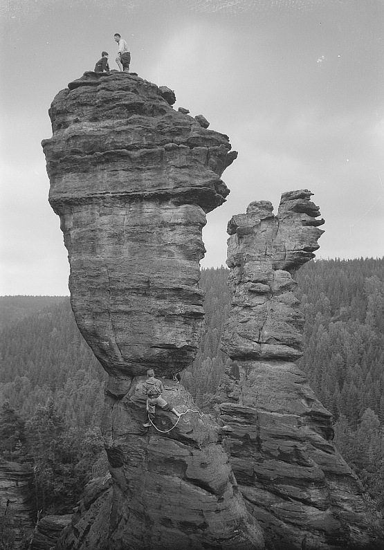 Original image description from the Deutsche Fotothek Die Herkulessäulen im Bielatal, zwei bekannte Kletterfelsen